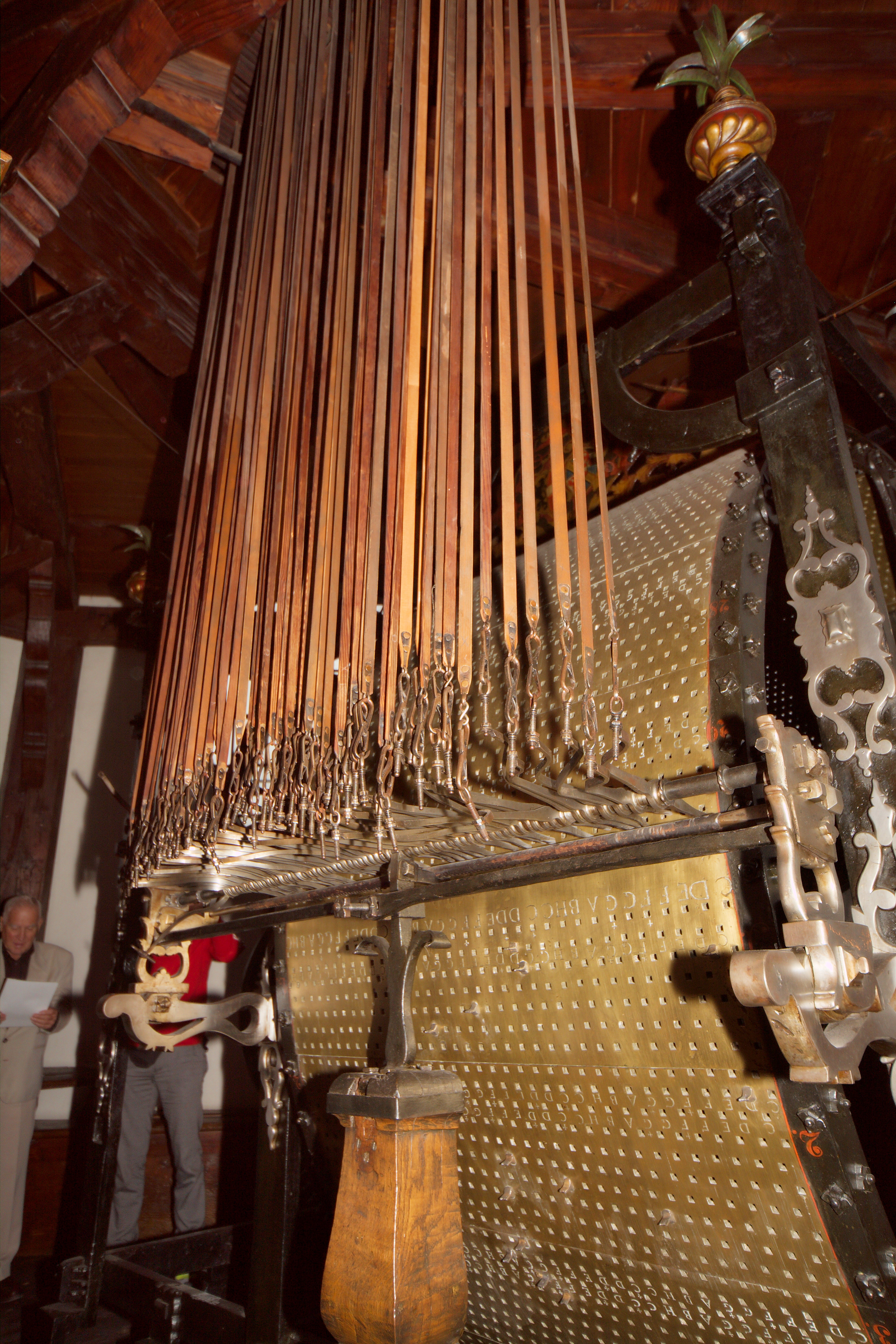 Salzburger Glockenspiel. Steuertrommel mit Seilzügen. In der Trommel sind 7940 Bohrungen, in die Schrauben eingesetzt werden, die über die Seilzüge (Lederriemen) die Hänmmer ansteuern. Man beachte die eingravierten Notenwerte.